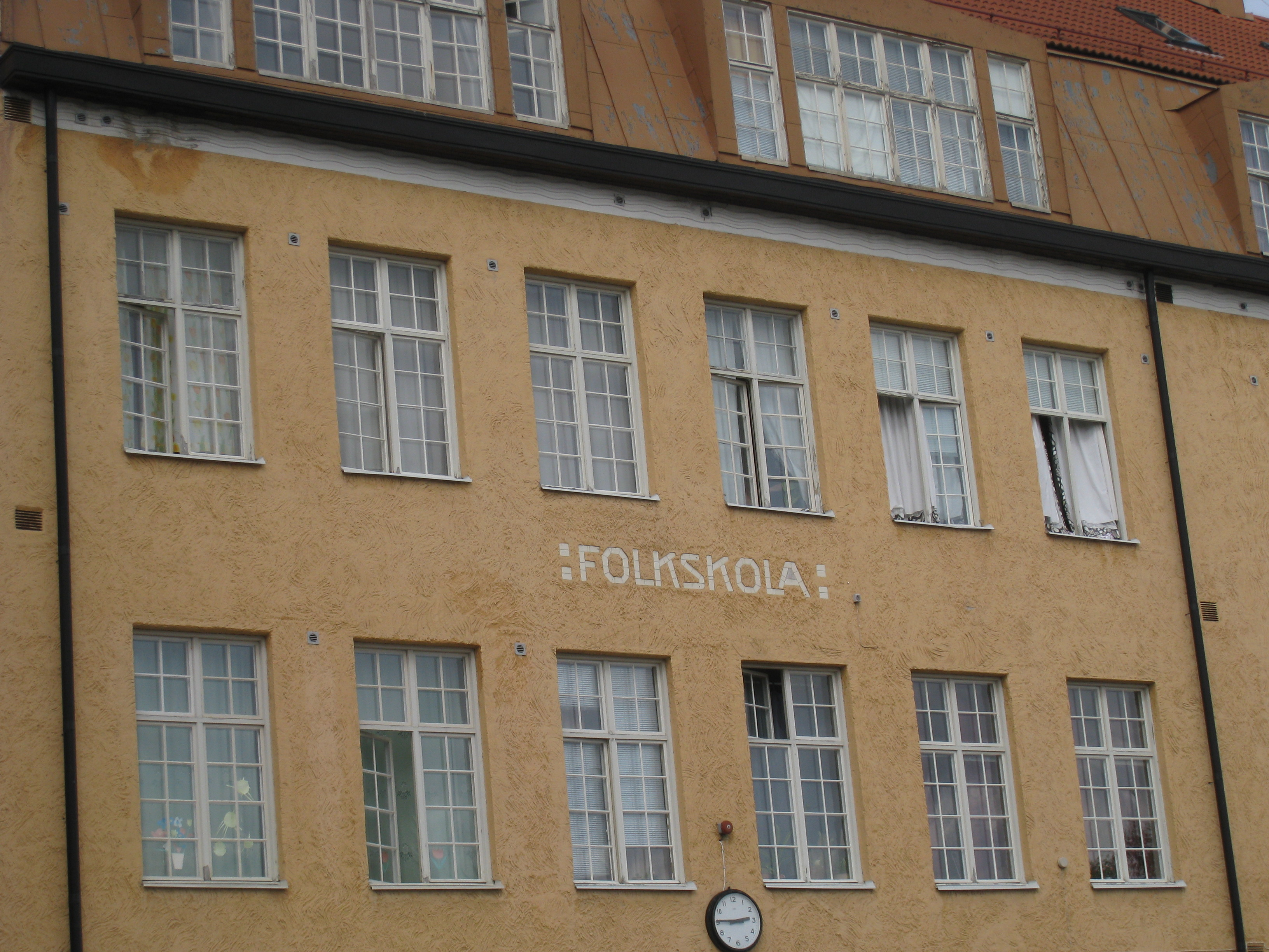 Bällstalunds folkskola i Bromma, byggd 1912, Bällstavägen 100, korsningen Travbanevägen-Bällstavägen, nu hotell för Maranataförsamlingen i Stockholm.